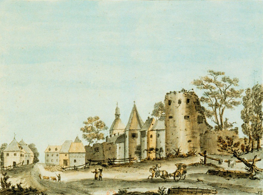 Guémar, l'une des 17 estampes en taille-douce coloriées, 23 x 16,5 cm, de Vues pittoresques de l'Alsace ; Librairie Académique, Strasbourg. Auteur du texte : Philippe-André Grandidier (1752-1787) ; illustrations : François Walter (1755-1830).